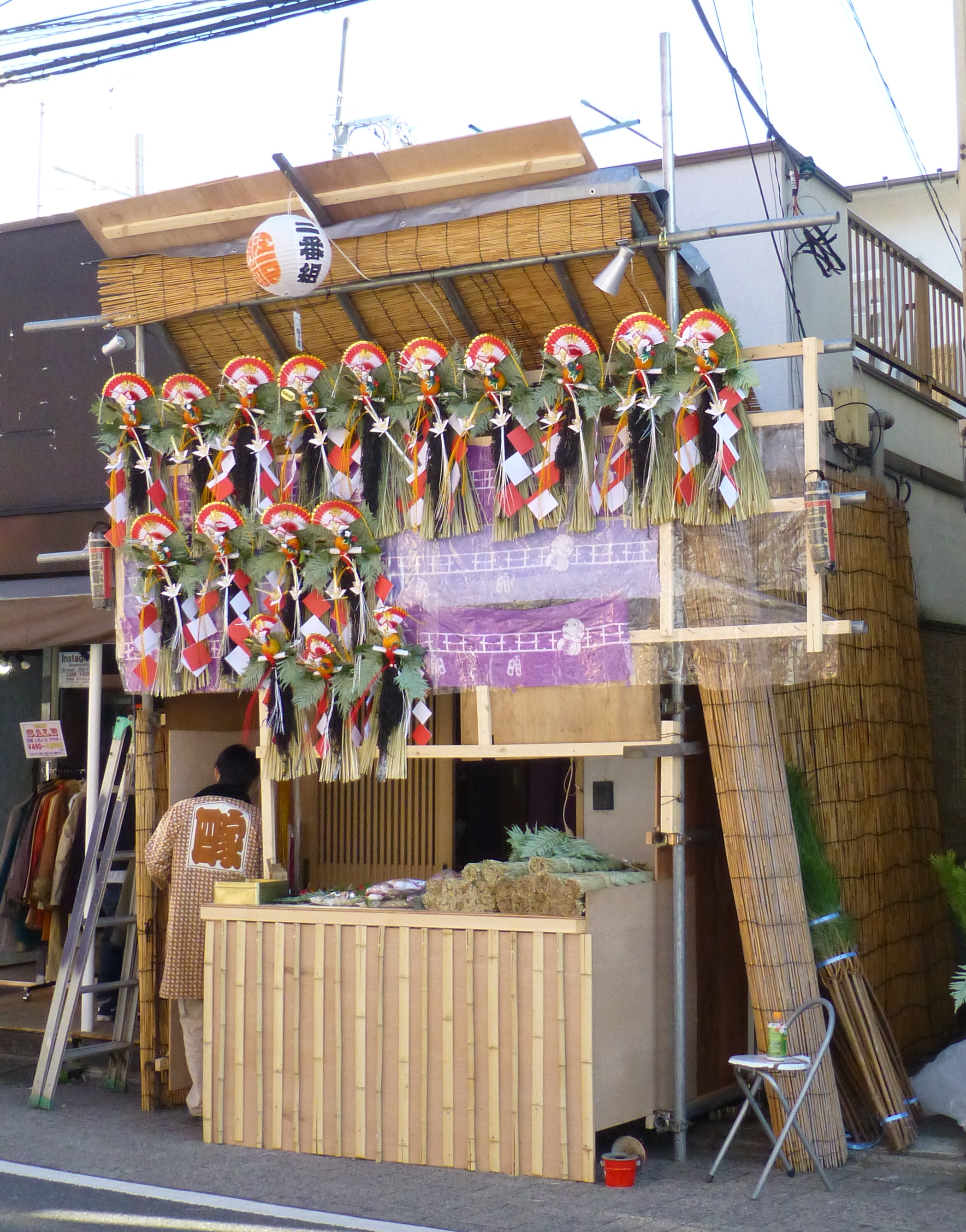 正月飾り (Shogatsu kazari)